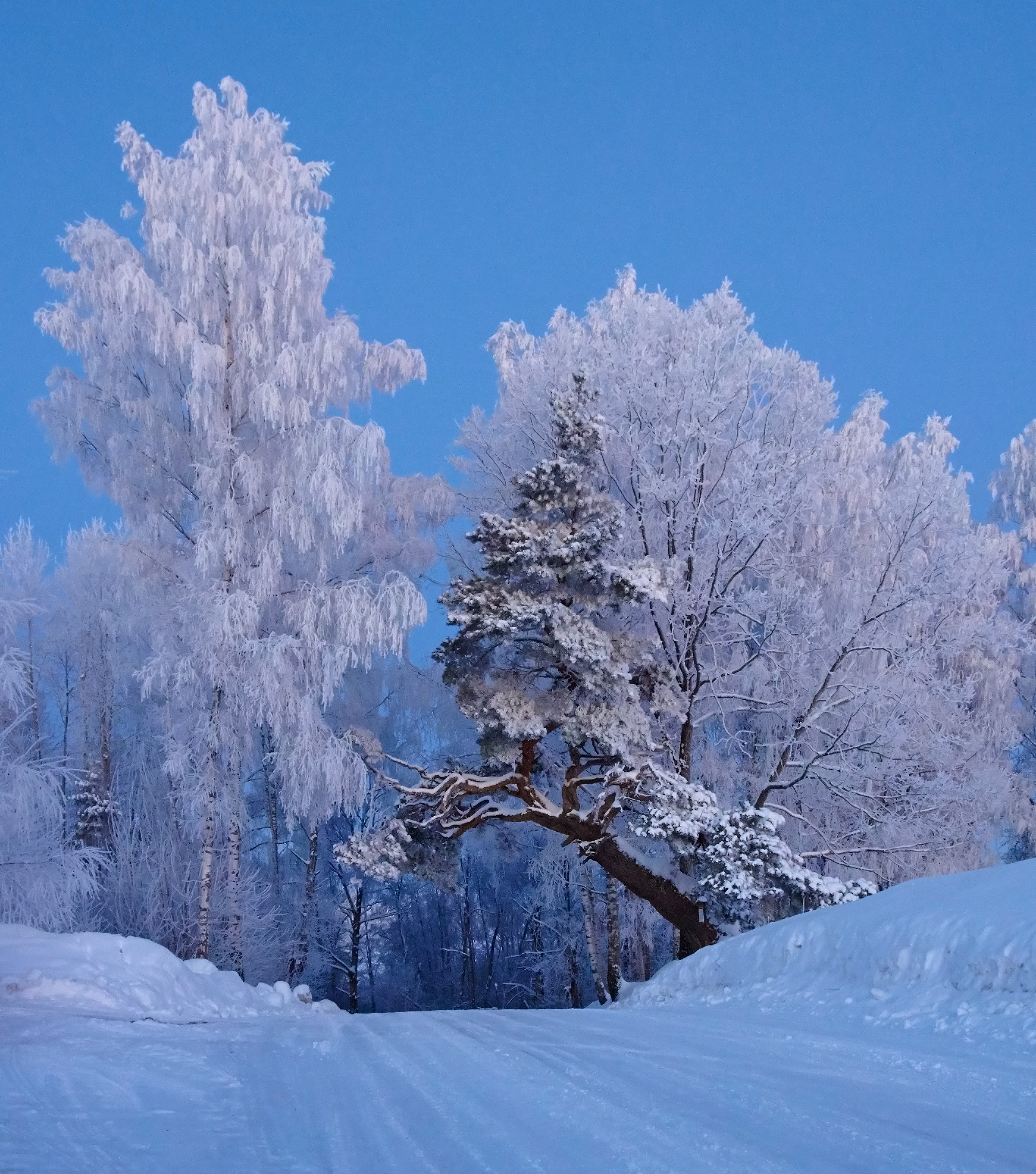 Toborna pettai